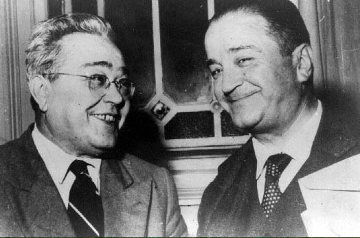 Ricardo Balbín & Crisólogo Larralde. circa 1950